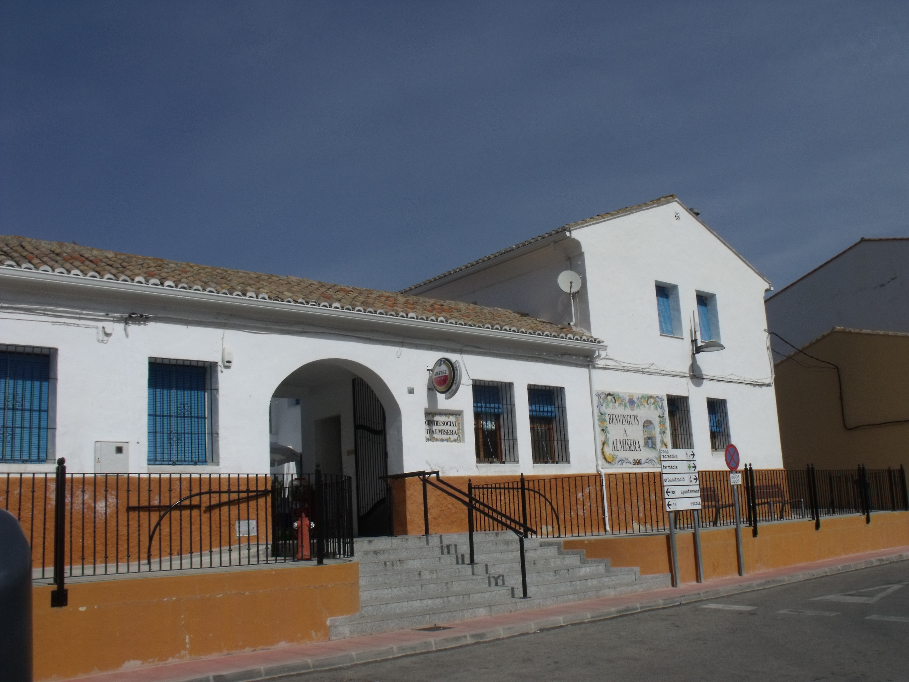 Almiserat, antiguo cuartel de la Guardia Civil utilizado como centro social